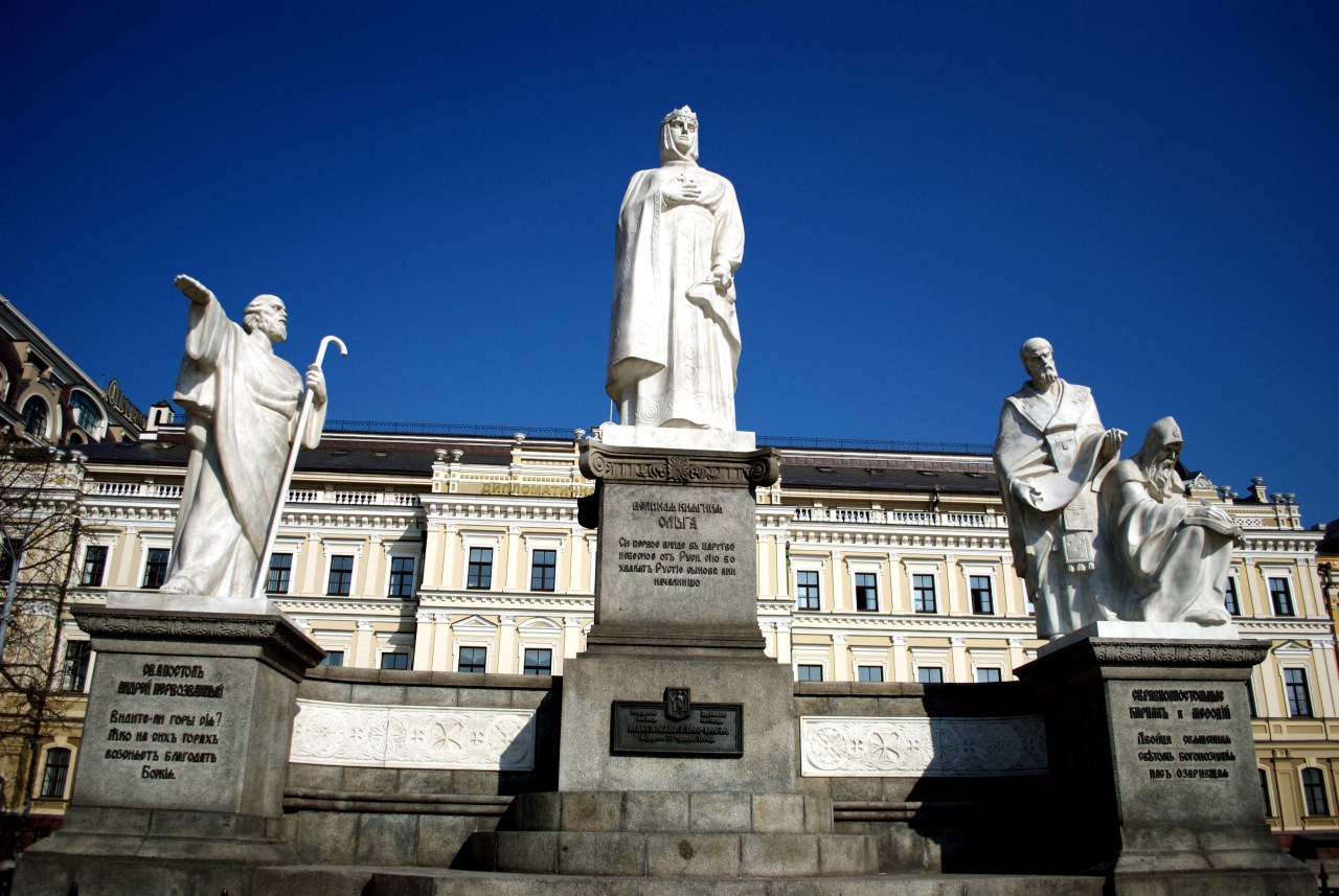 Пам'ятник княгині Ользі, Андрію Первозванному та Кирилу і Мефодію в Києві